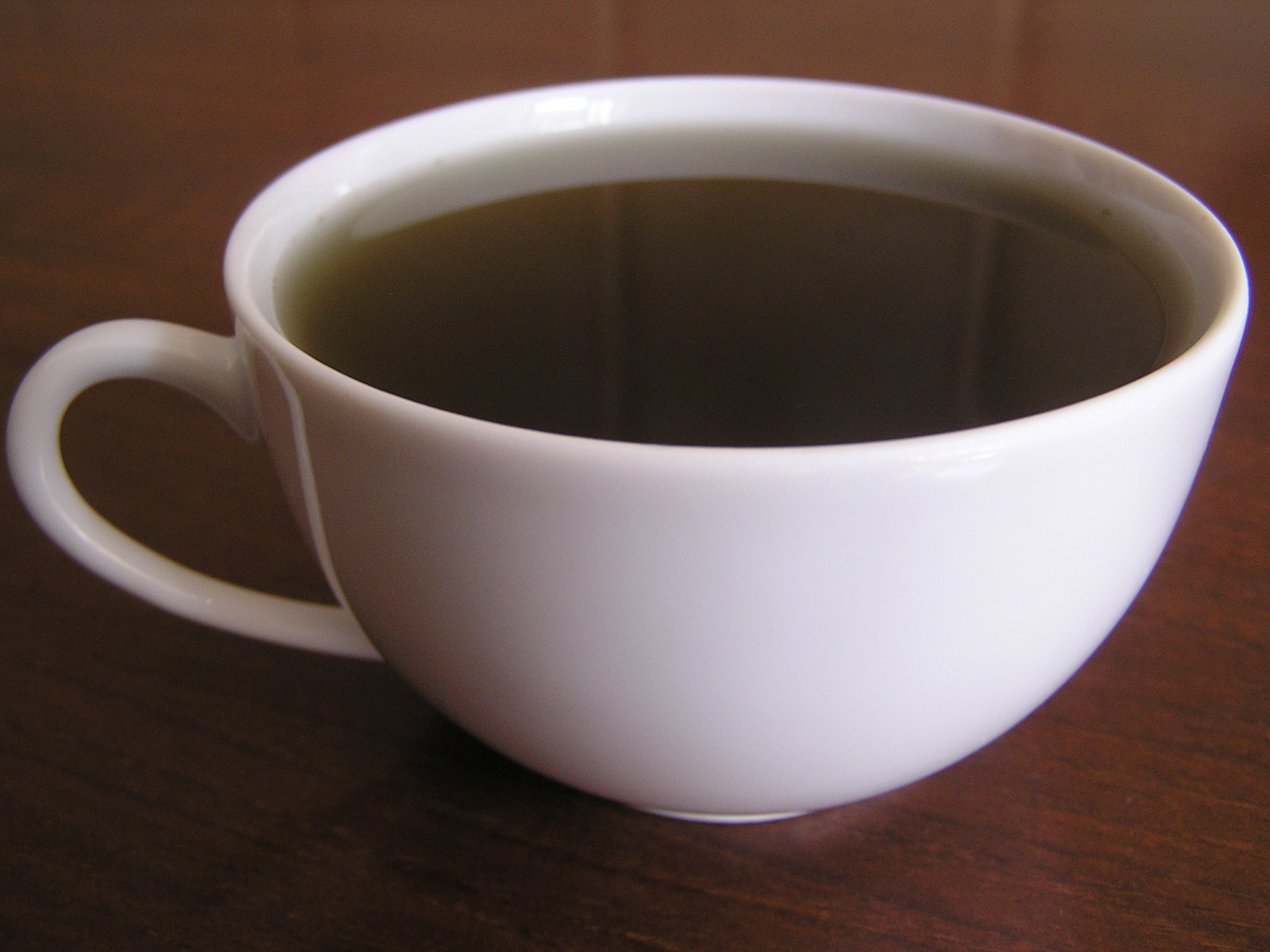 Una tazza da tè contenente del mate